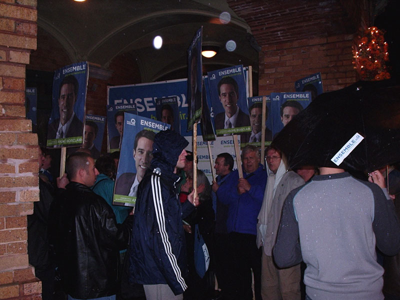 fr: Photographie de militants d'André Boisclair à la sortie du débat public de Québec, lors de l'élection de 2005 à la direction du Parti québécois. Prise par Benoît Rheault, Liberlogos. en: Picture of André Boisclair militants at the exit of the Quebec City public debate, during the Parti Québécois leadership election, 2005. Taken by Benoît Rheault, Liberlogos.